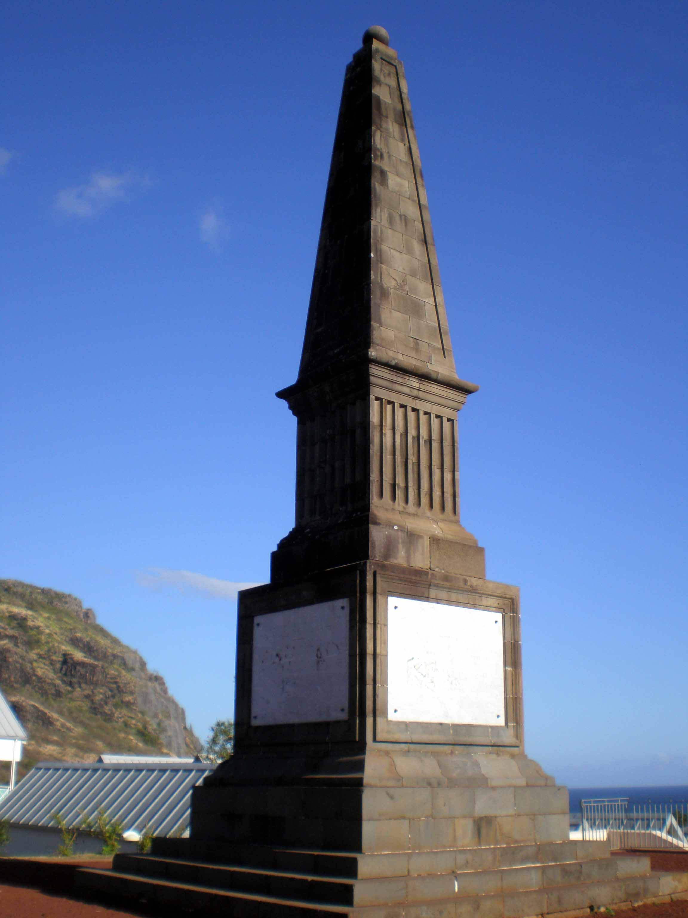 Stèle commémorative d'un combat entre Français et Britanniques à La Réunion en 1810